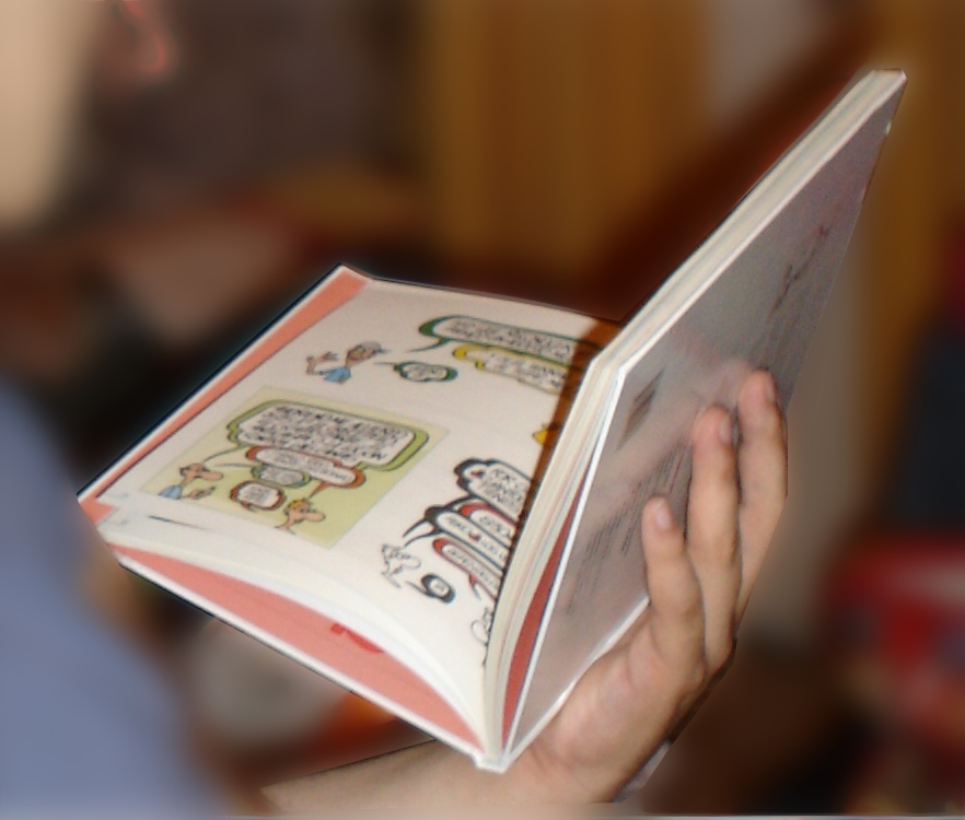 Divertiéndose con Forges